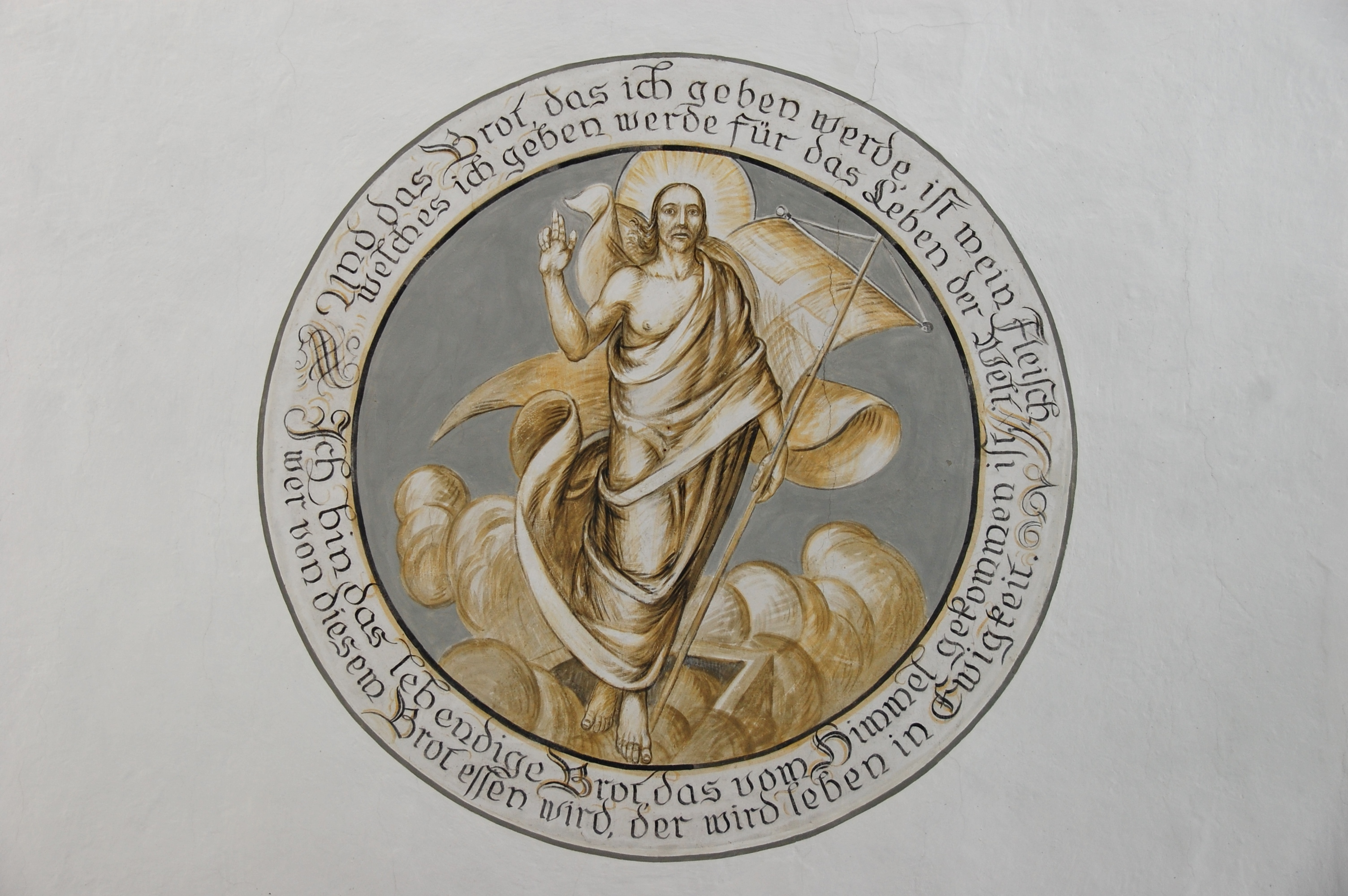 Evangelische Kirche Birklar